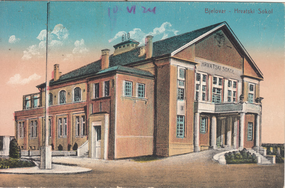 Zgrada Hrvatskog sokola u Bjelovaru